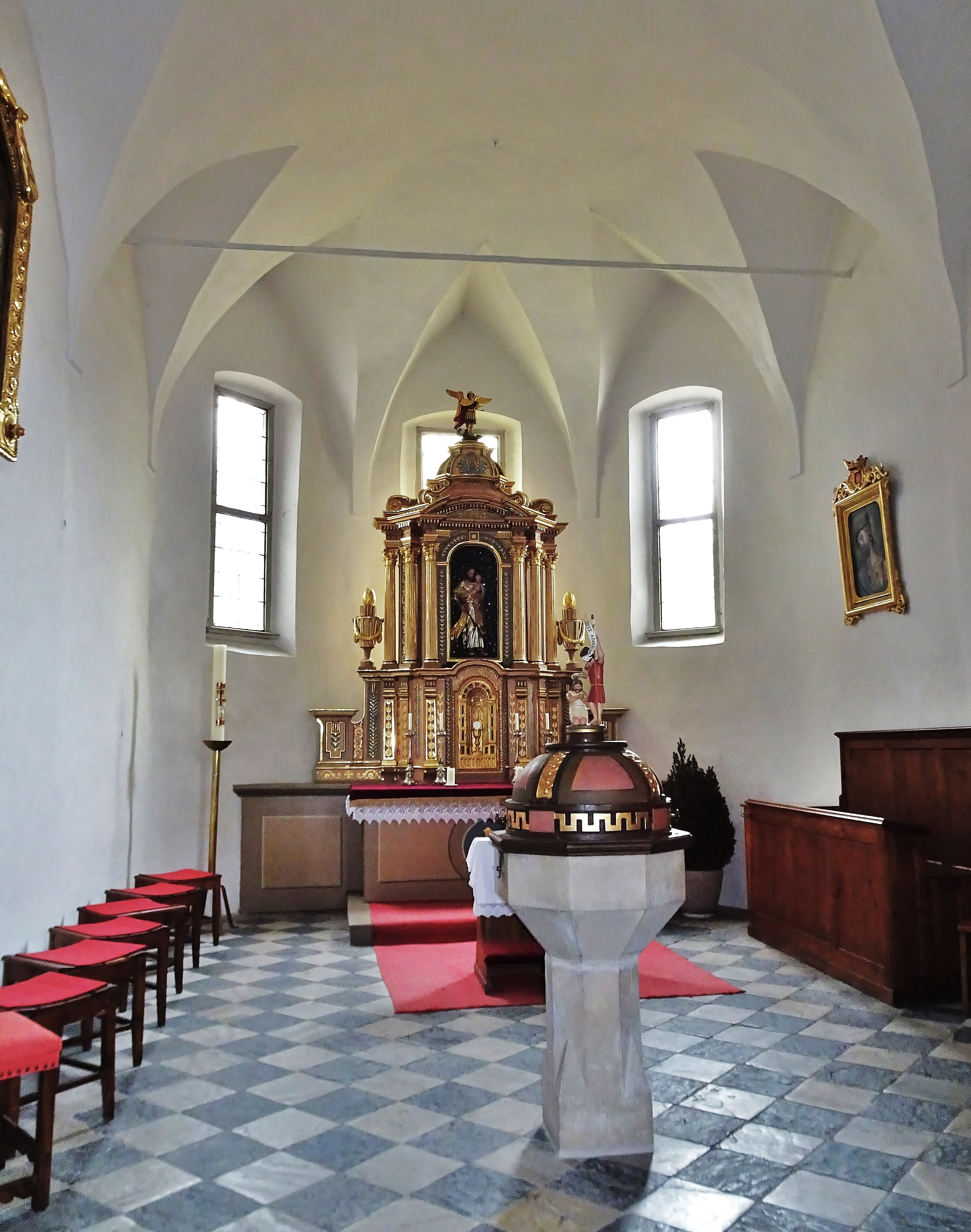 Kath. Pfarrkirche St. Maximilian Treffen, Blick in die Michaelskapelle